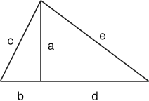 La bildo estas kopiita de en. La originala priskribo estas